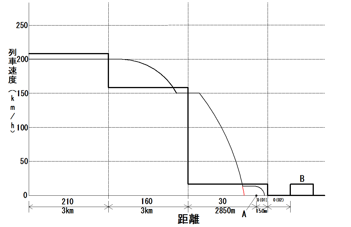 ATC-1型の先行列車に接近時におけるATCのブレーキ動作のグラフ図。